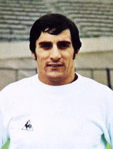 Charly Loubet (1970, O. Marseille), 'Ageducatifs 1970 - 1971', Panini figurina n°100.